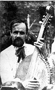 Petro Tkachenko